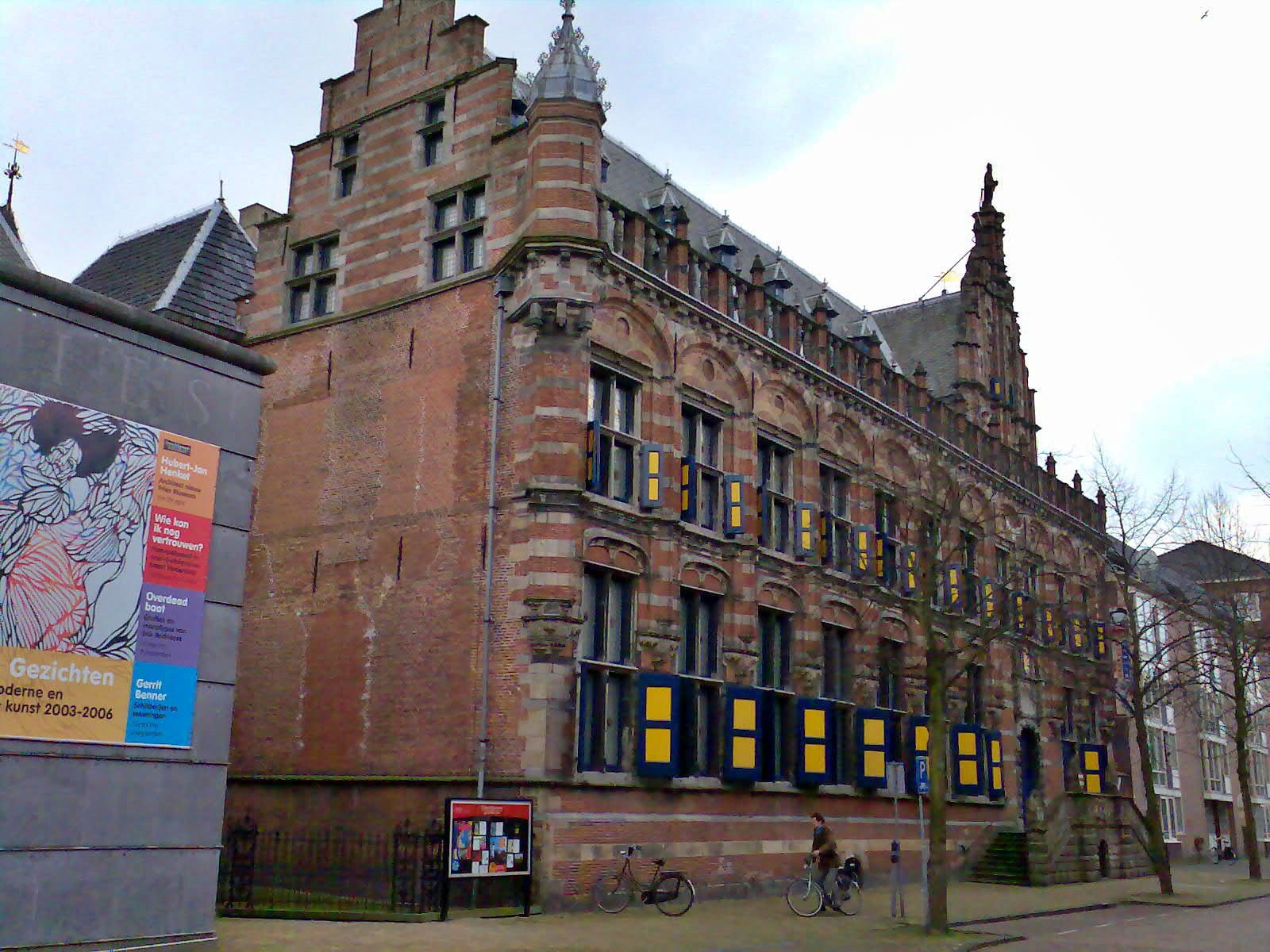 Kanselerij Leeuwarden